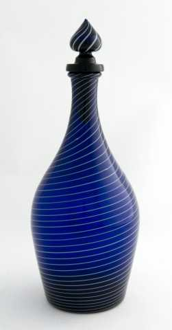 Koboltfarget karaffel med innlgte hvite spiraler. Antakelig laget på Gjøvik glassverk ca 1810. Nå på Norsk Folkemuseum. NF.1900-0029